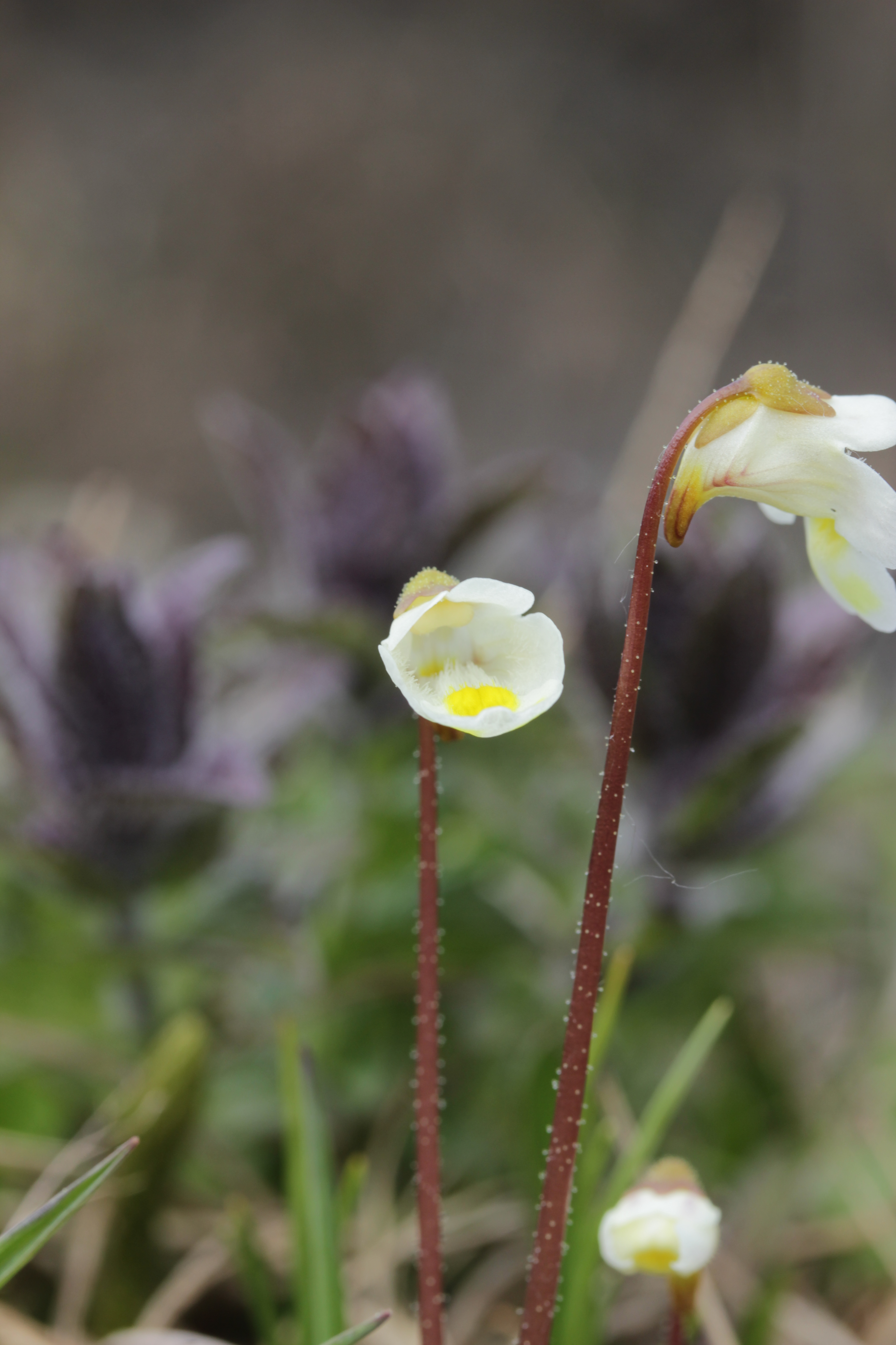 Alpine Butterwort - Pinguicula alpina